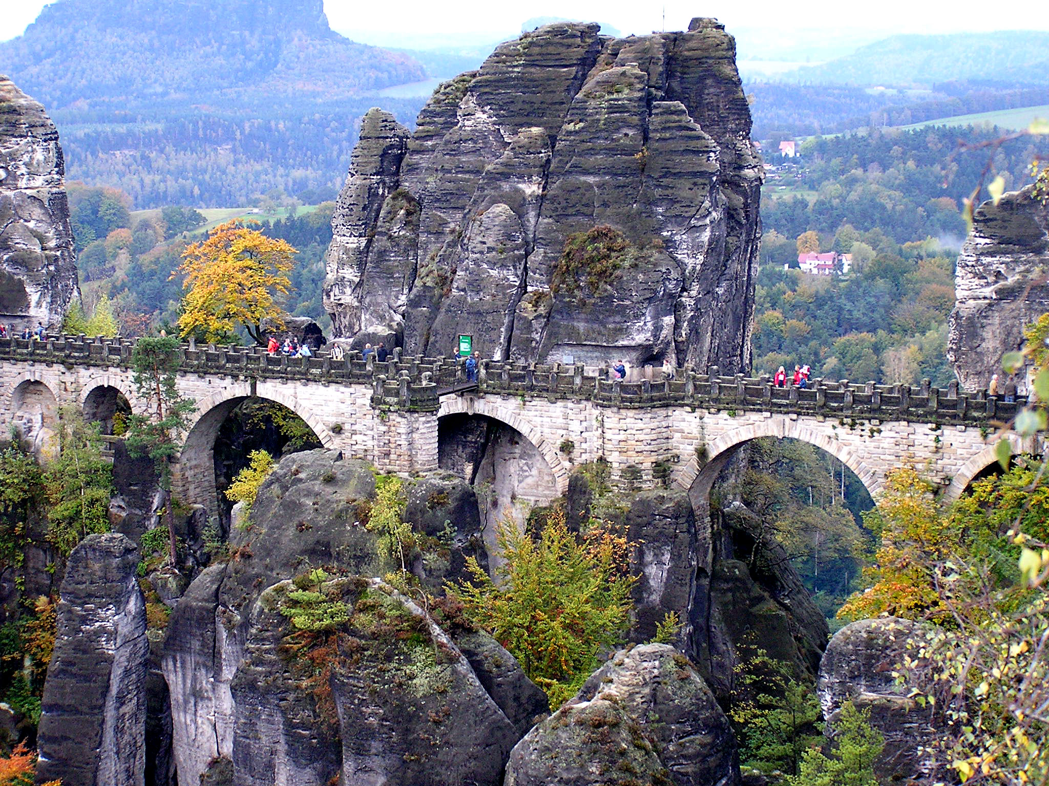 Bastei in der sächsischen Schweiz. Blick auf die Basteibrücke.